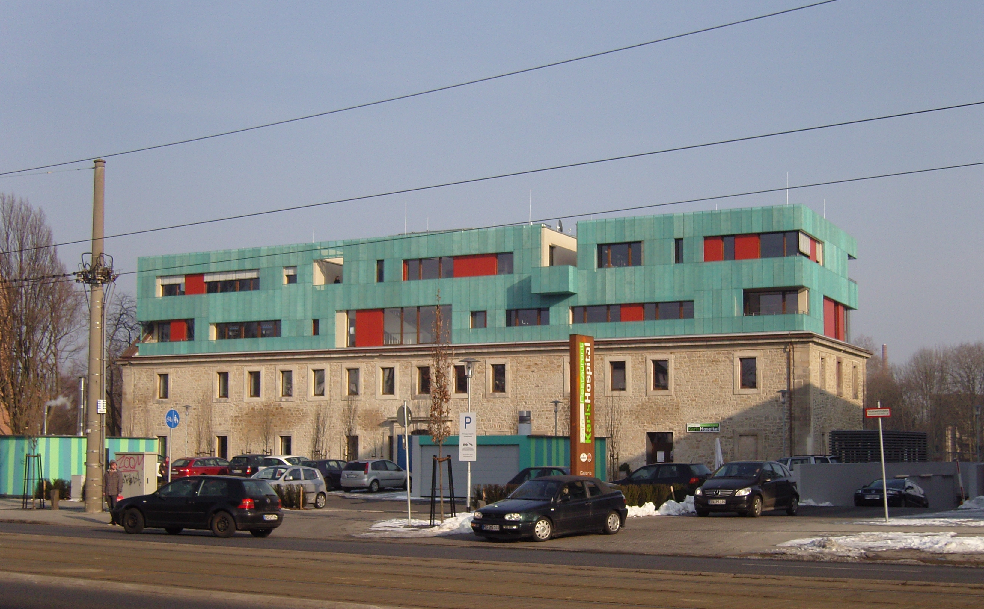 Karlshopital Kassel, gesehen Weserstraße in Richtung Katzensprung.